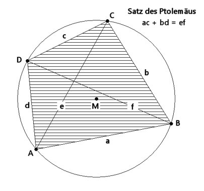 Das Bild zeigt den Satz des Ptolemäus in einem Sehnenviereck